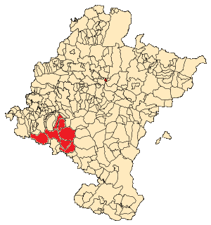 Mapa condado de Lerín